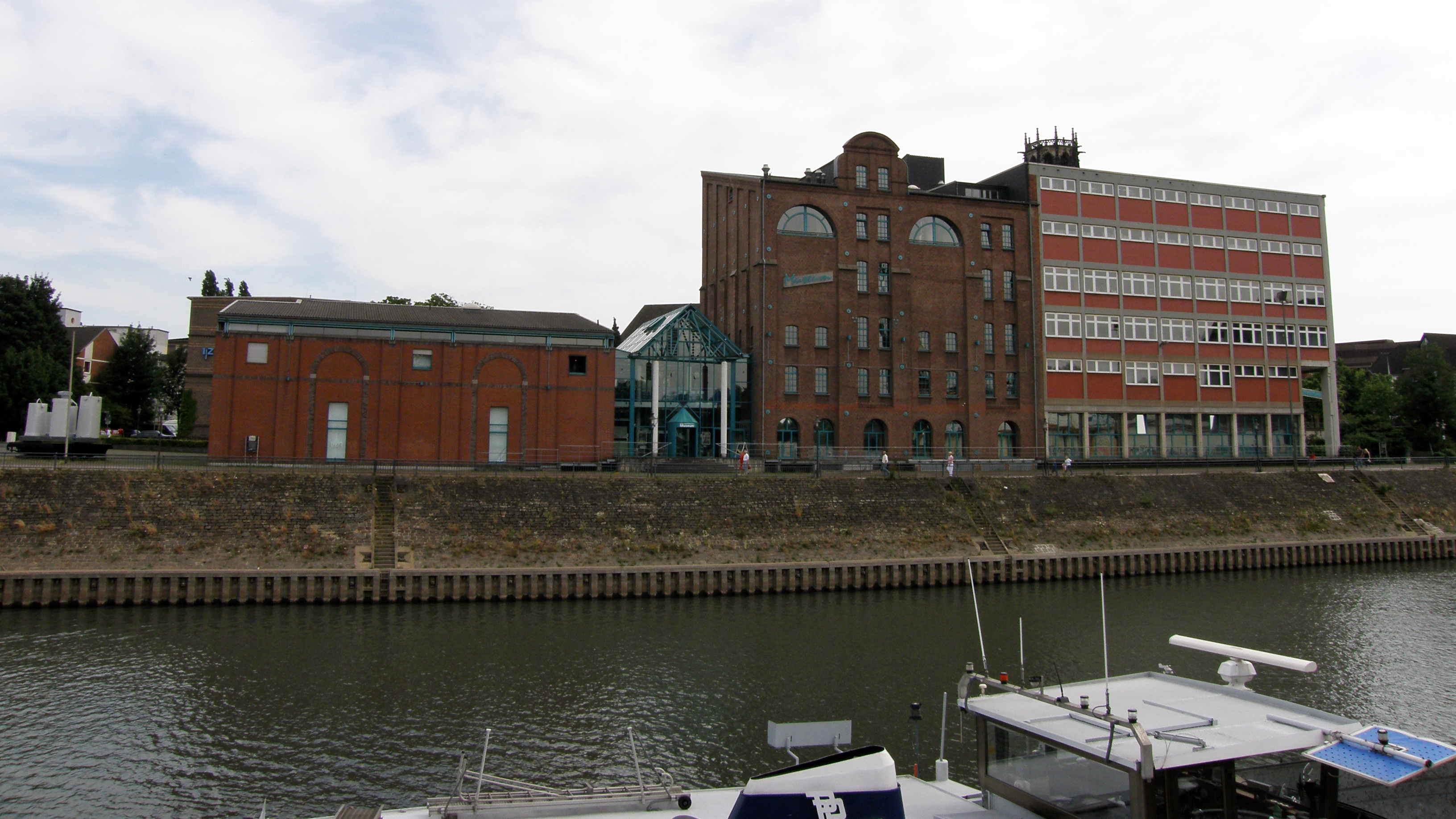 Innenhafen Duisburg Kultur- und Stadthistorisches Museum Duisburg, Museum Stadt Königsberg und Stadtarchiv Duisburg in den Gebäuden: Kleiner Kampfmeyer-Speicher und Roter Getreidesilo